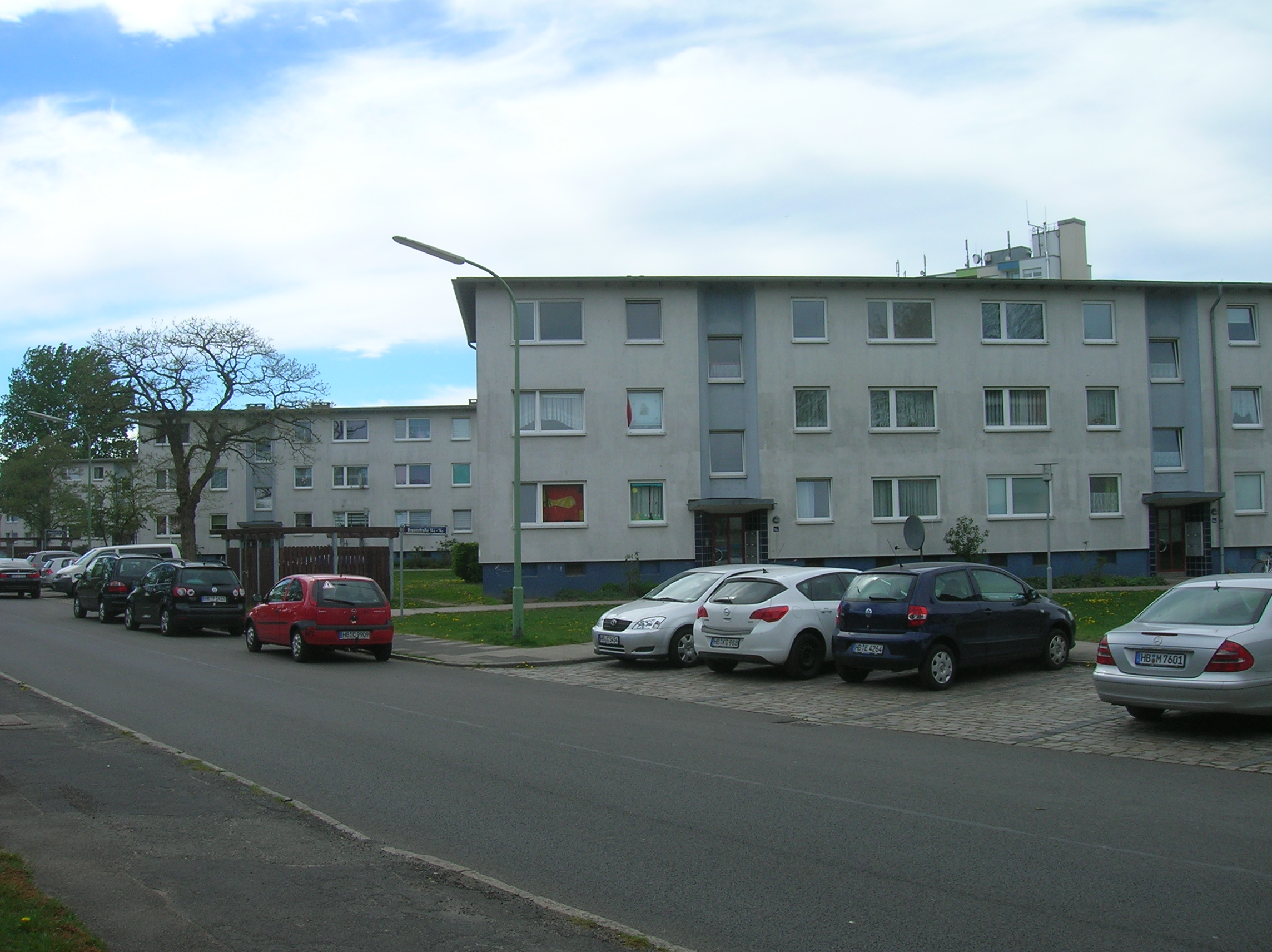 Wohnblocks des Sozialen Wohnungsbaus (Neue Heimat) in Grünhöfe, Bremerhaven-Geestemünde